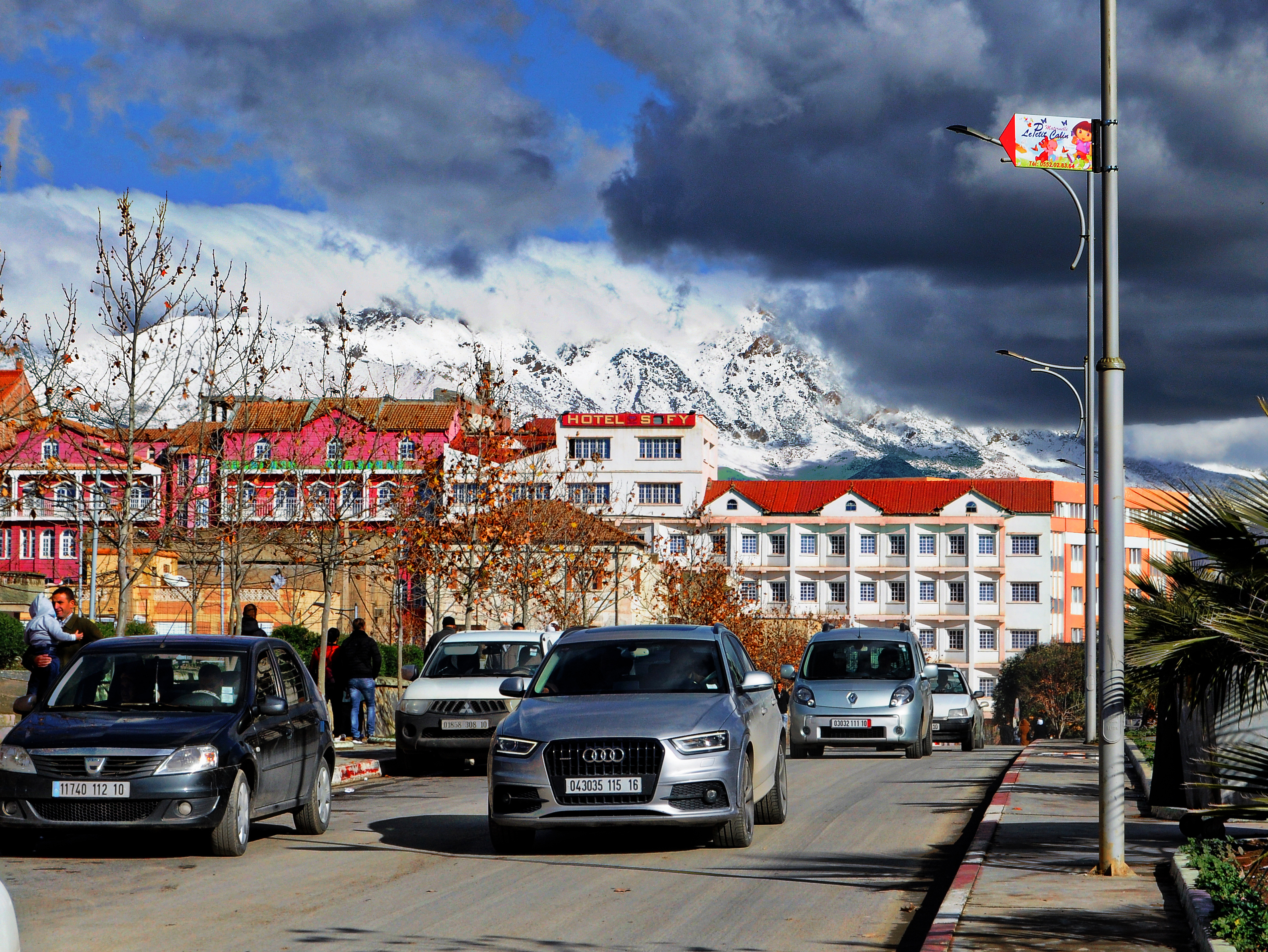 la ville de Bouira